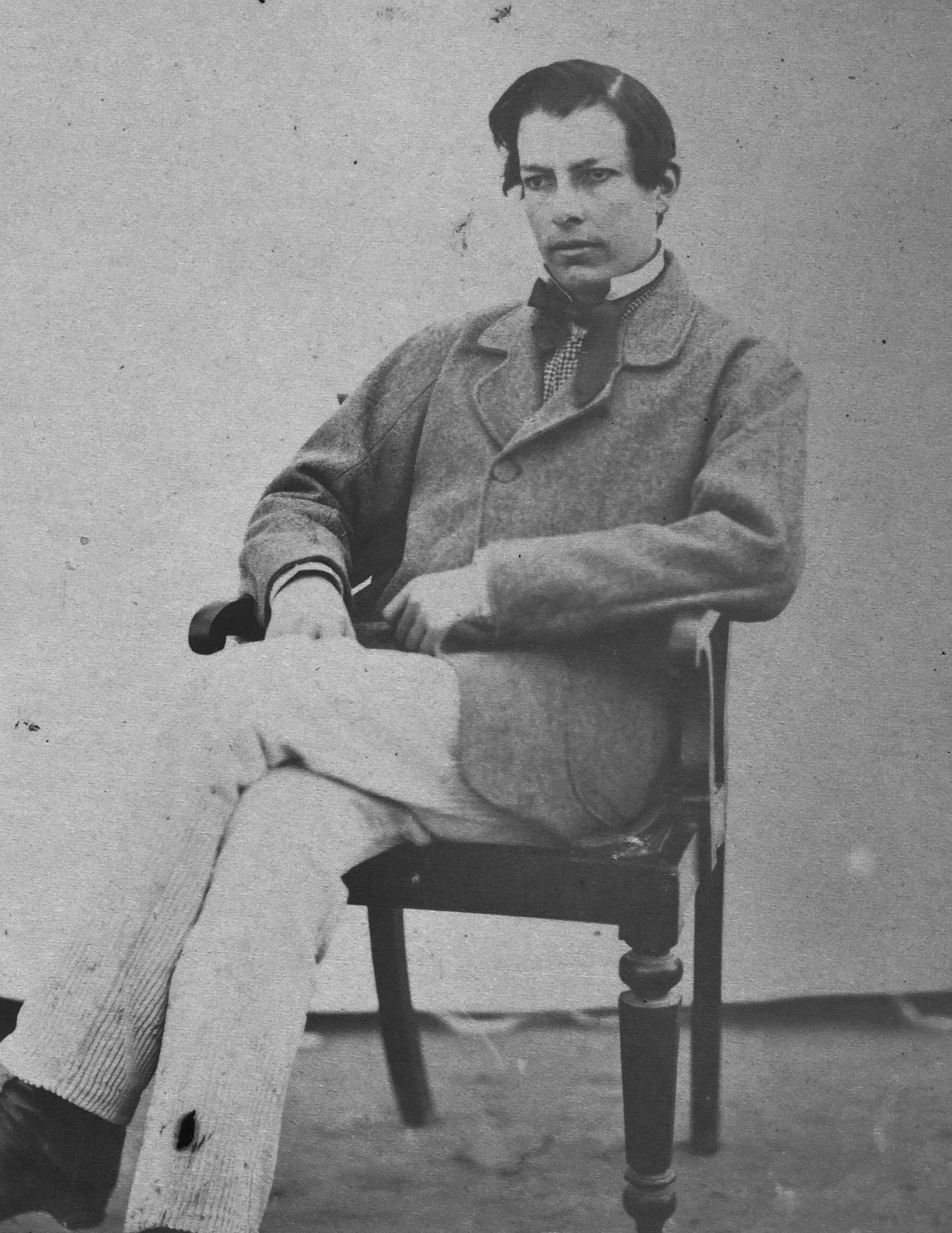 Emmanuel Bonavia, M.D., Brigade Surgeon, Bengal Medical Service